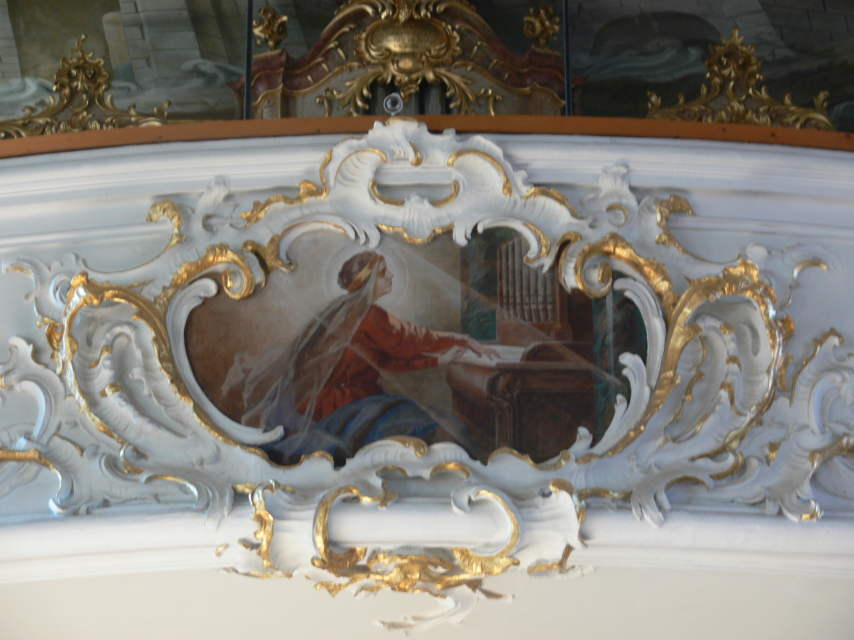 Pfarrkirche St. Pankratius, Wiggensbach Gemälde an der Empore: Hl. Cäcilia an der Orgel